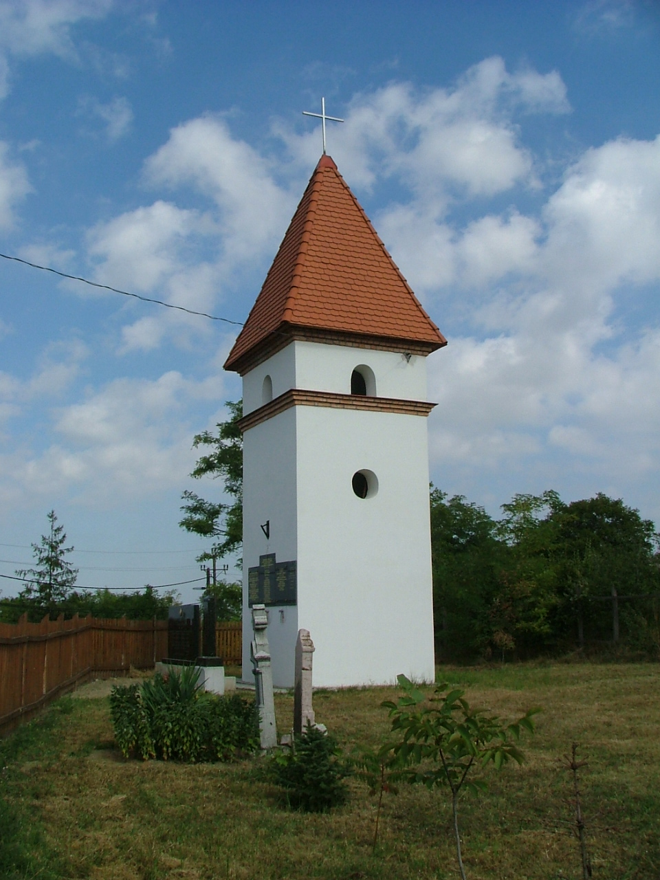 Felújított harangláb Győrújbaráton